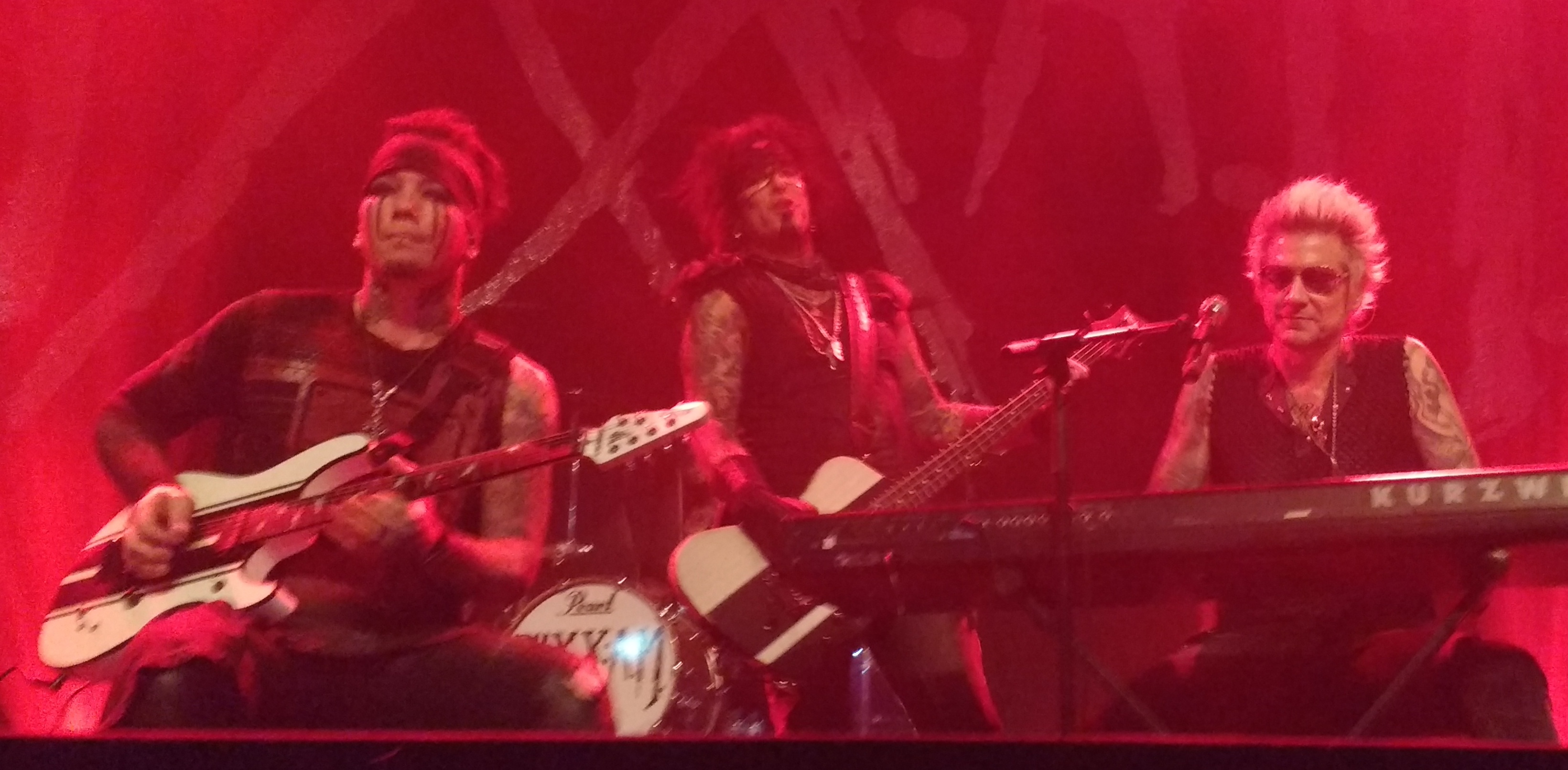 Sixx:A.M. tijdens hun eerste optreden in Nederland, in Utrecht